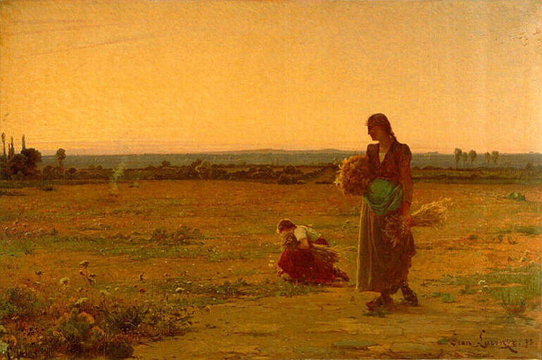 Jean_Laronze,1852-1937,Le_Soir,1893,130x195_cm,_Mâcon,Musée_des_Ursulines.